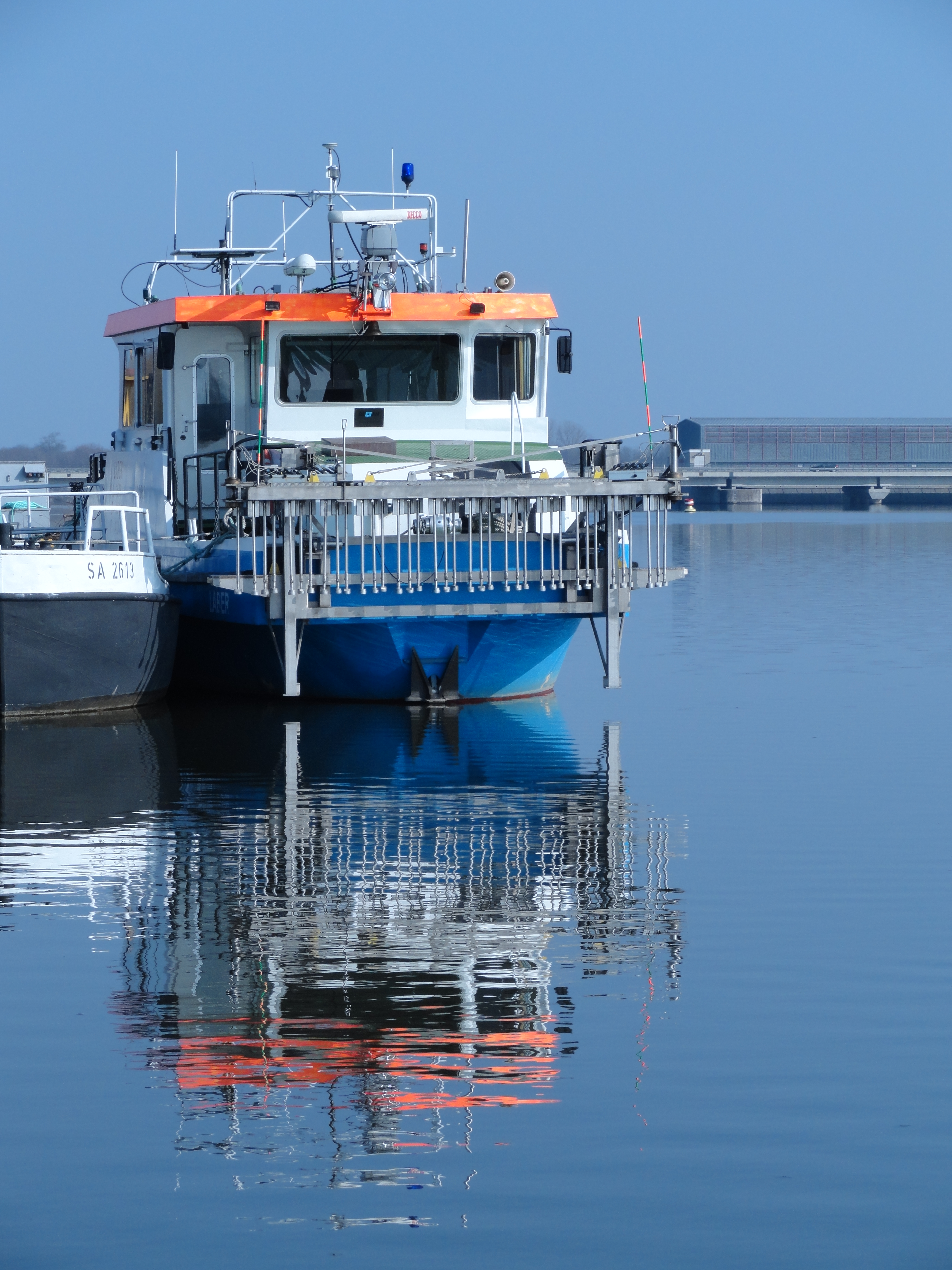 Peilschiff Laber der WSV im Oberwasser der Staustufe Straubing